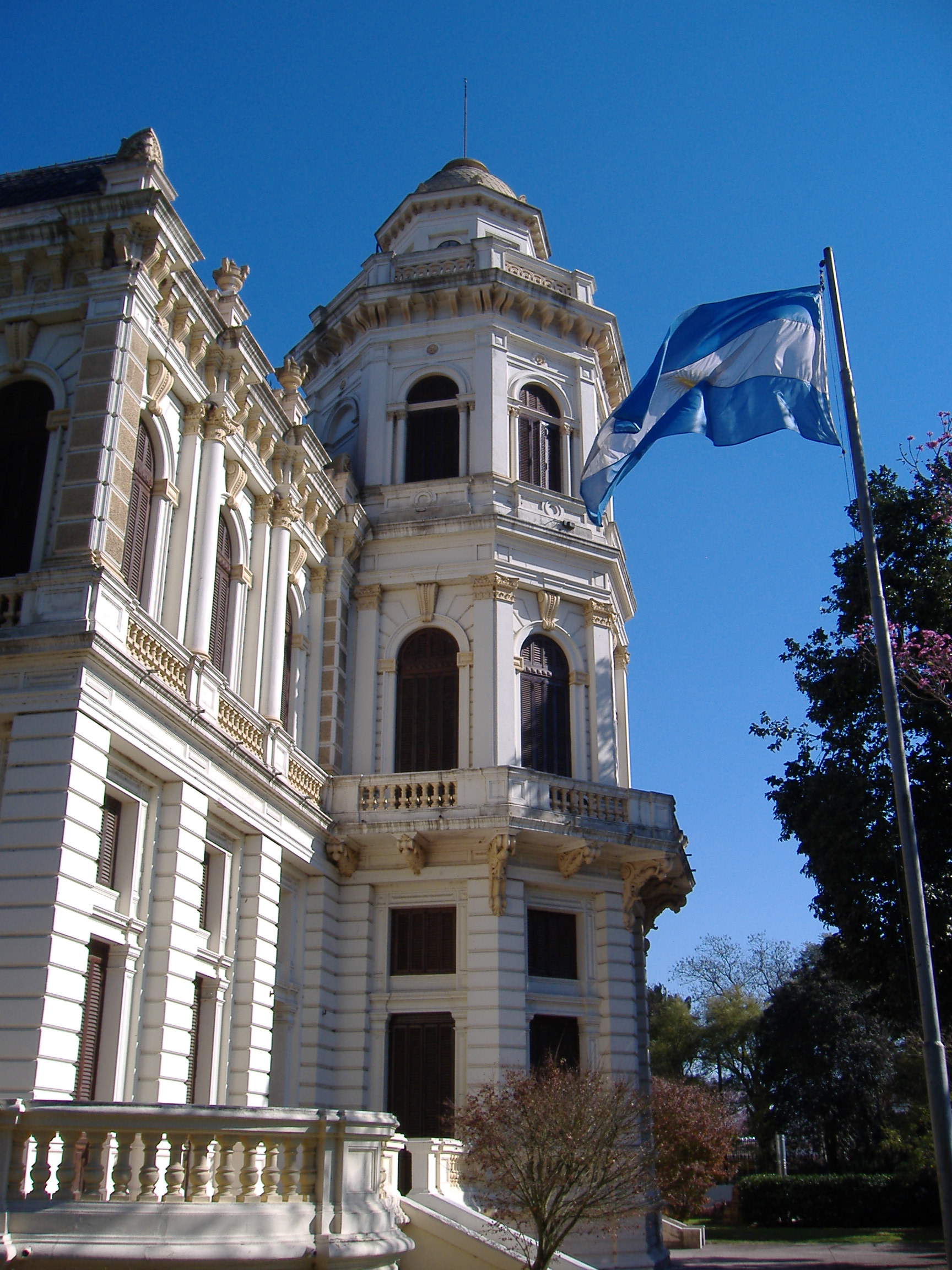 Villa Hortensia, an old mansion in Barrio Alberdi, Rosario, Argentina.